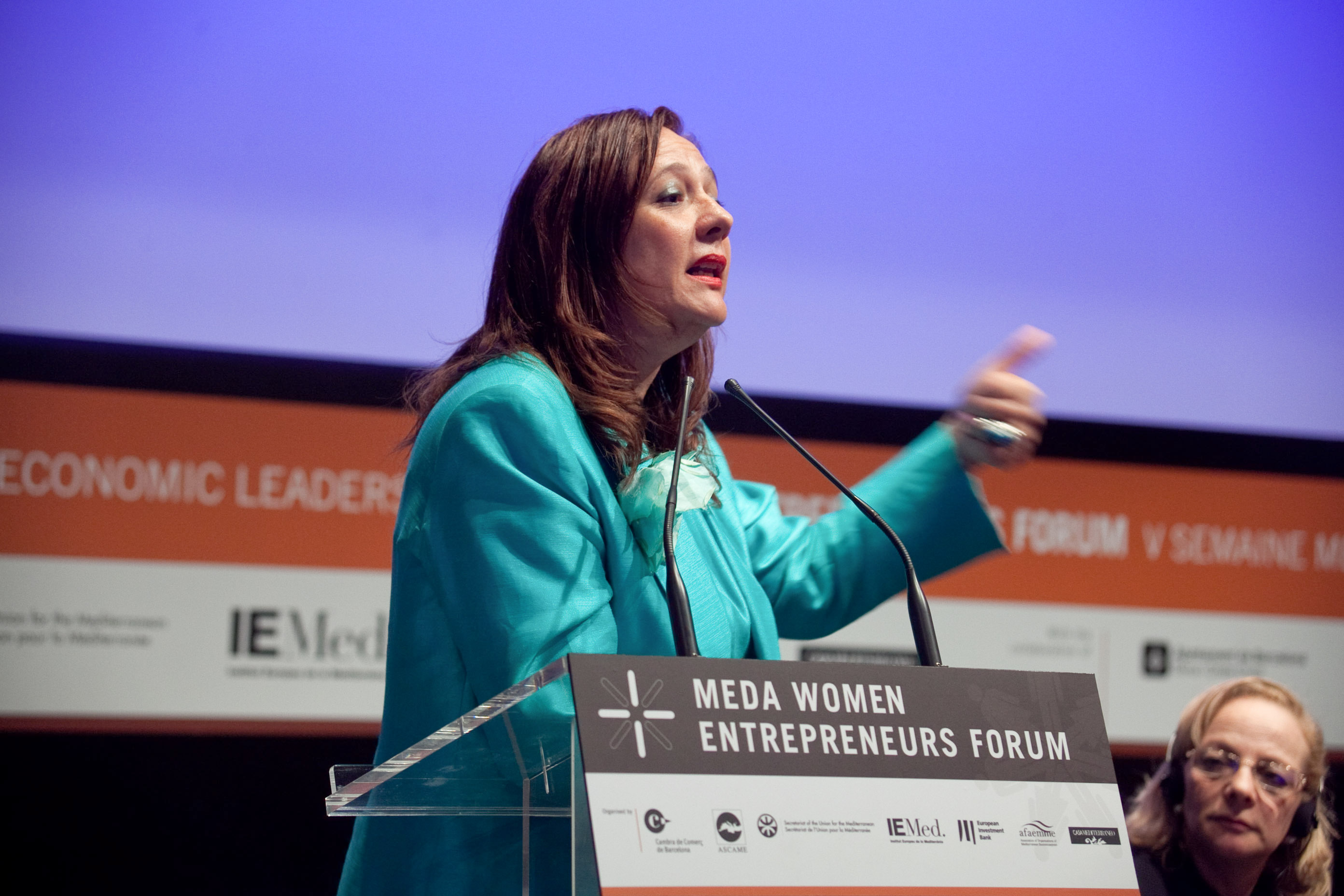 Amany Asfour, presidenta de la associació egipcia de dones empresaries en la seva intervenció a Casa Llotja.